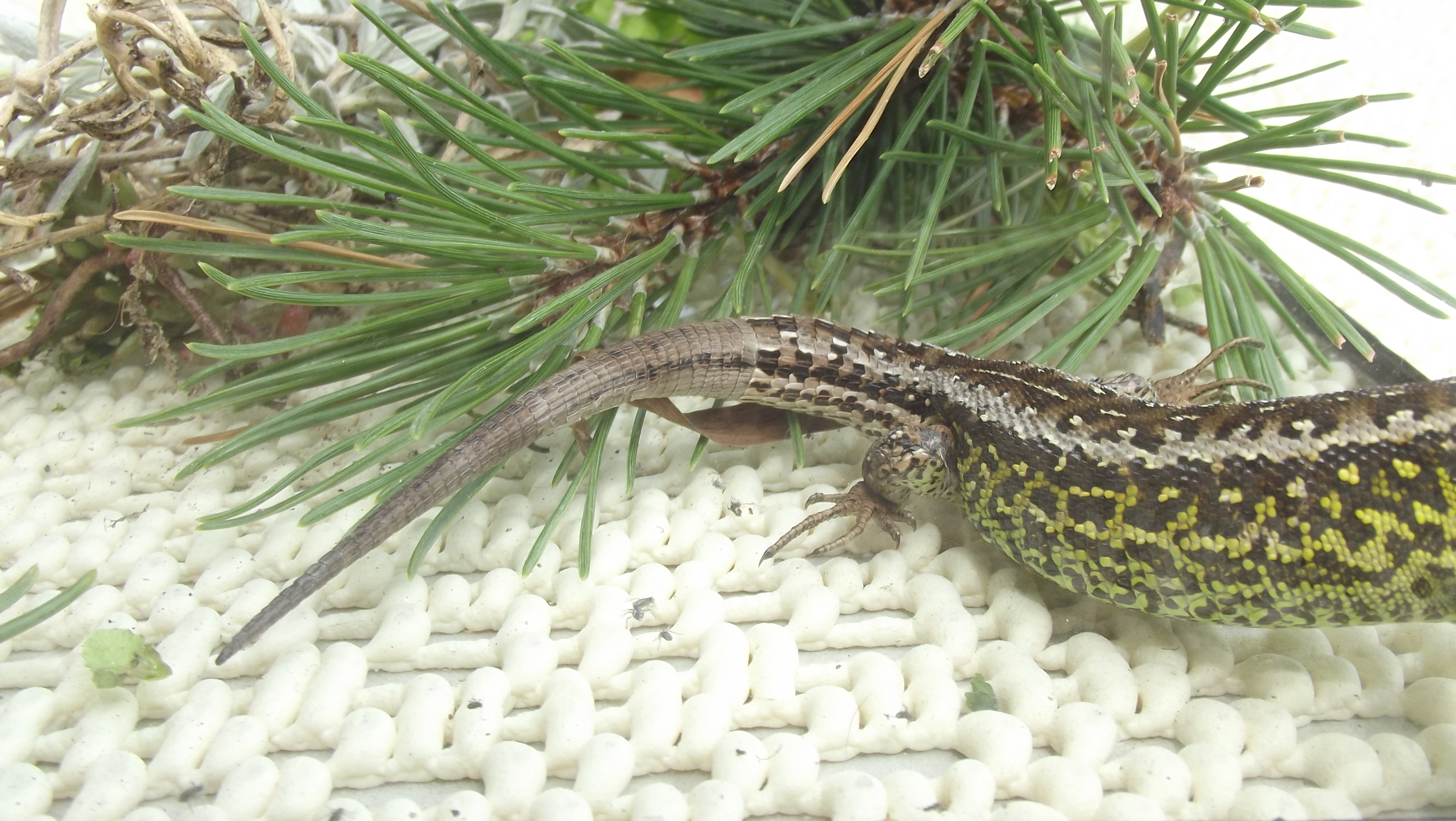 Lacerta agilis